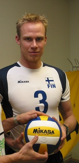 Finland volleyball player Mikko Esko (2006)